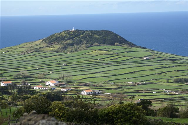 Pico Matias Simão, Altares, Angra do Heroísmo, Ilha Terceira, Arquipélago dos Açores, Portugal